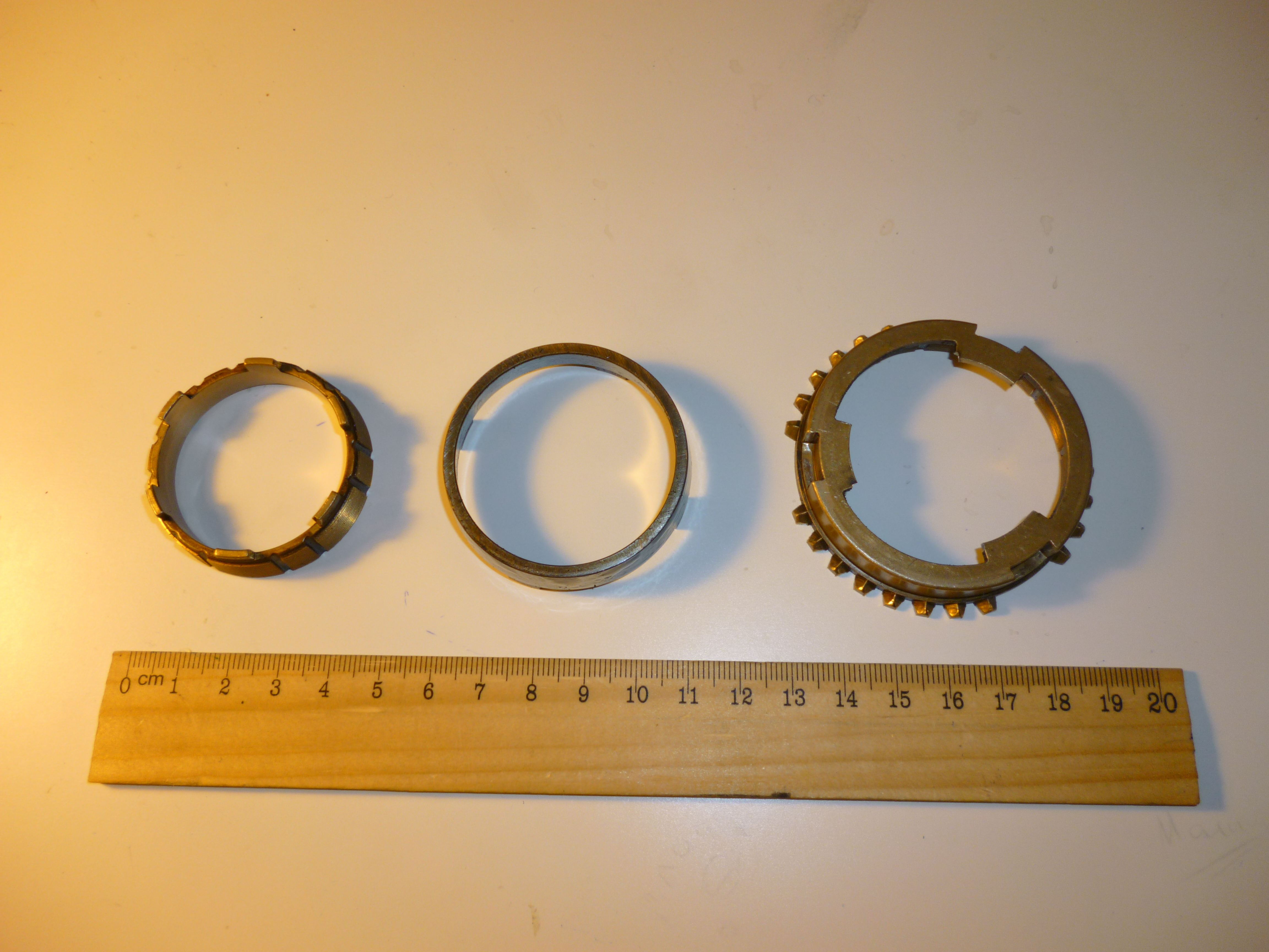 Состоящий из 3 частей синхронизатор II-й передачи автомобиля Suzuki Wagon R+. Средняя часть передает момент вращения на синхронизируемое зубчатое колесо, две другие бронзовые, и воспринимают усилие от муфты.